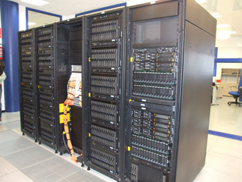 Supercomputador Pablo.